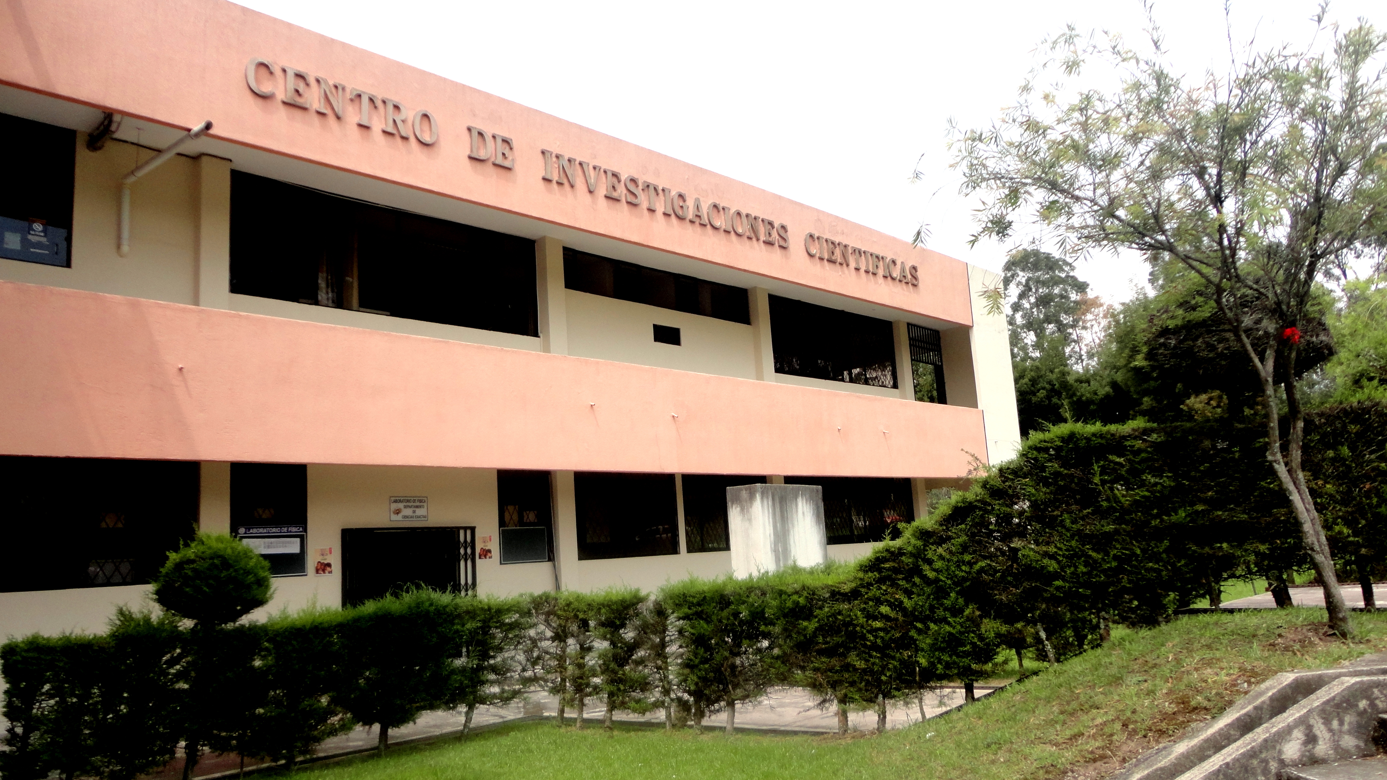 Centro de investigaciones cientificas.